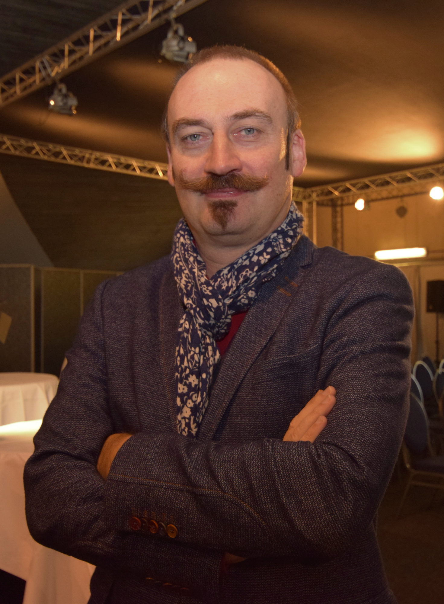 Bert Kruismans in Mechelen als gastspreker op de woonbeurs Wonen 2016